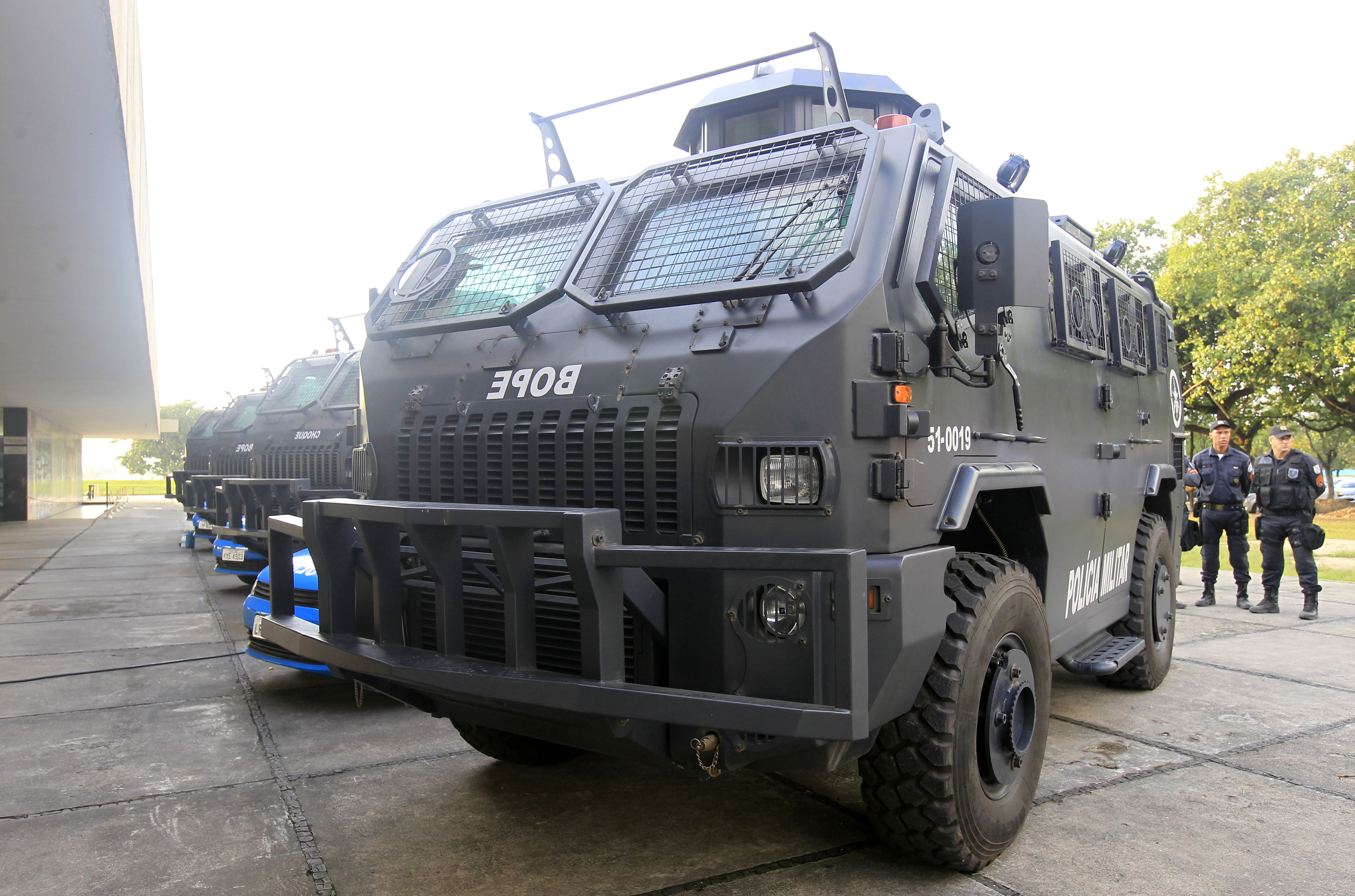 Entrega de oito veículos táticos blindados e 300 viaturas para as Unidades de Polícia Pacificadora (UPPs).